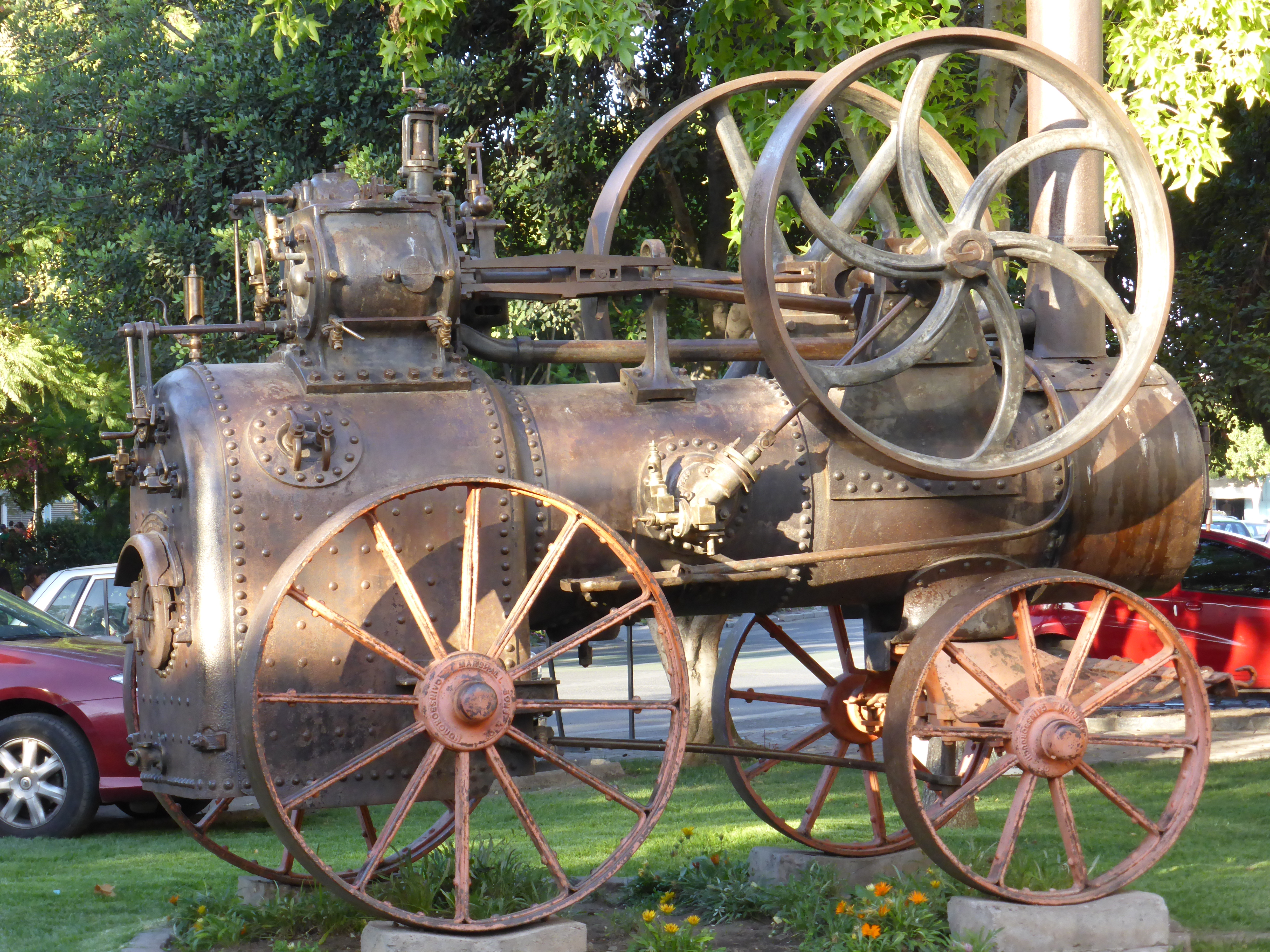 A comienzos del siglo XX, en el campo se utilizaba maquinaria a vapor, como este locomóvil. Fue construido en Gainsborough (Lincolnshire), Inglaterra, por "Marshall Sons & Cº Limited Engineers", con el número 39821 (según placa). Potencia, 8 HP. En otra placa se lee: "Britannia Engine". Se encuentra frente a la fachada de la sede de la "Ilustre Municipalidad de Talagante". En una placa conmemorativa moderna se dice: "A la ciudad de Talagante, en el 163º Aniversario de su fundación, por su generosa hospitalidad. Sr. Cheng Yuan Liang y familia. Talagante, 6 de Diciembre de 2000".